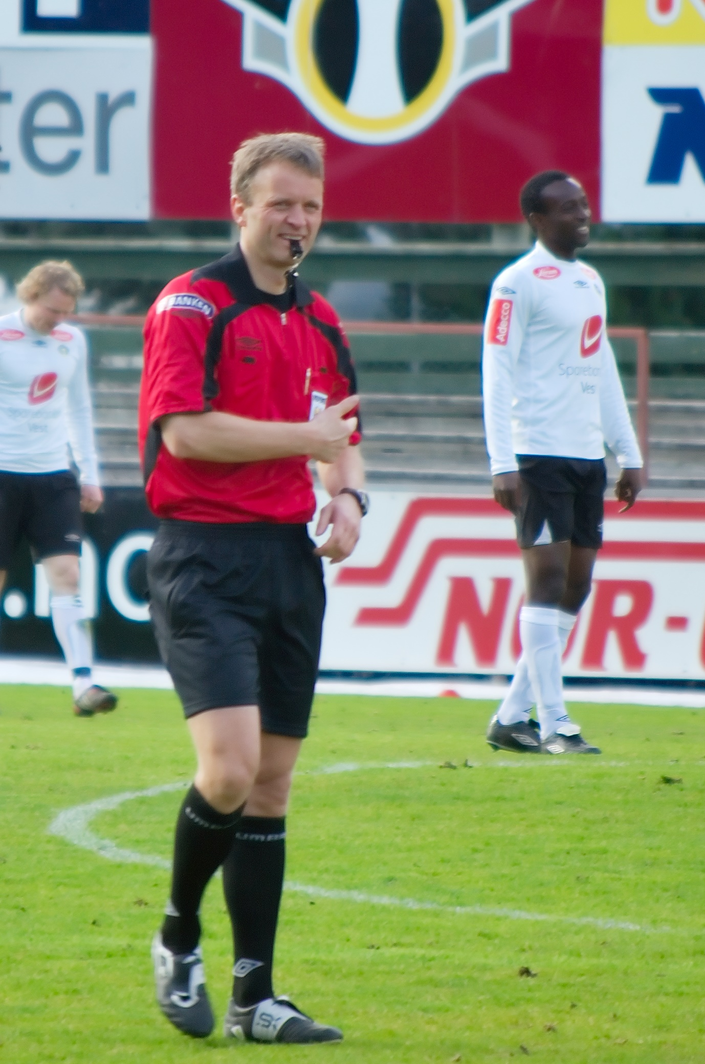 Tommy Skjerven